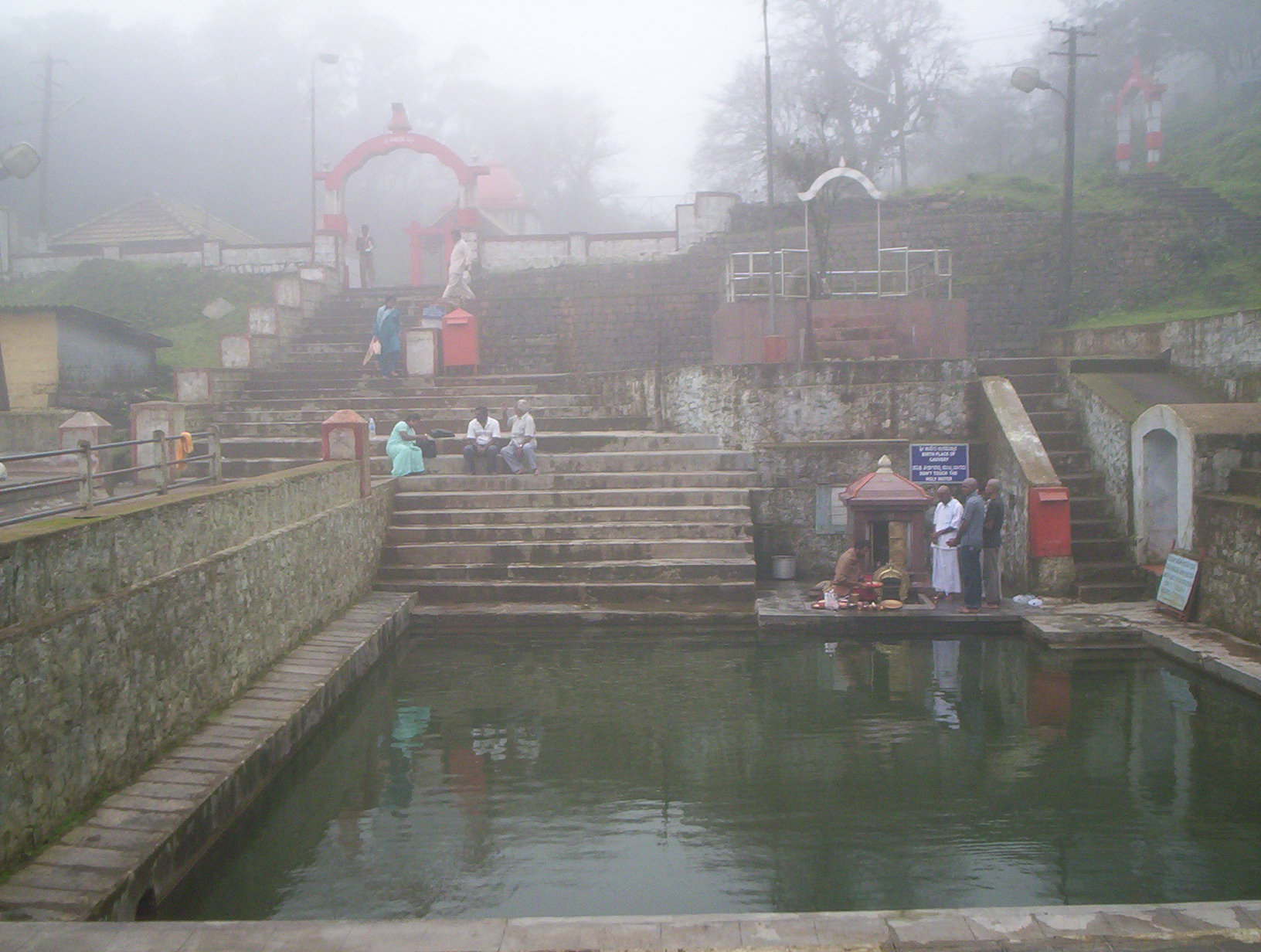 Talakaveri (origin of Kaveri river) in Karnataka, India